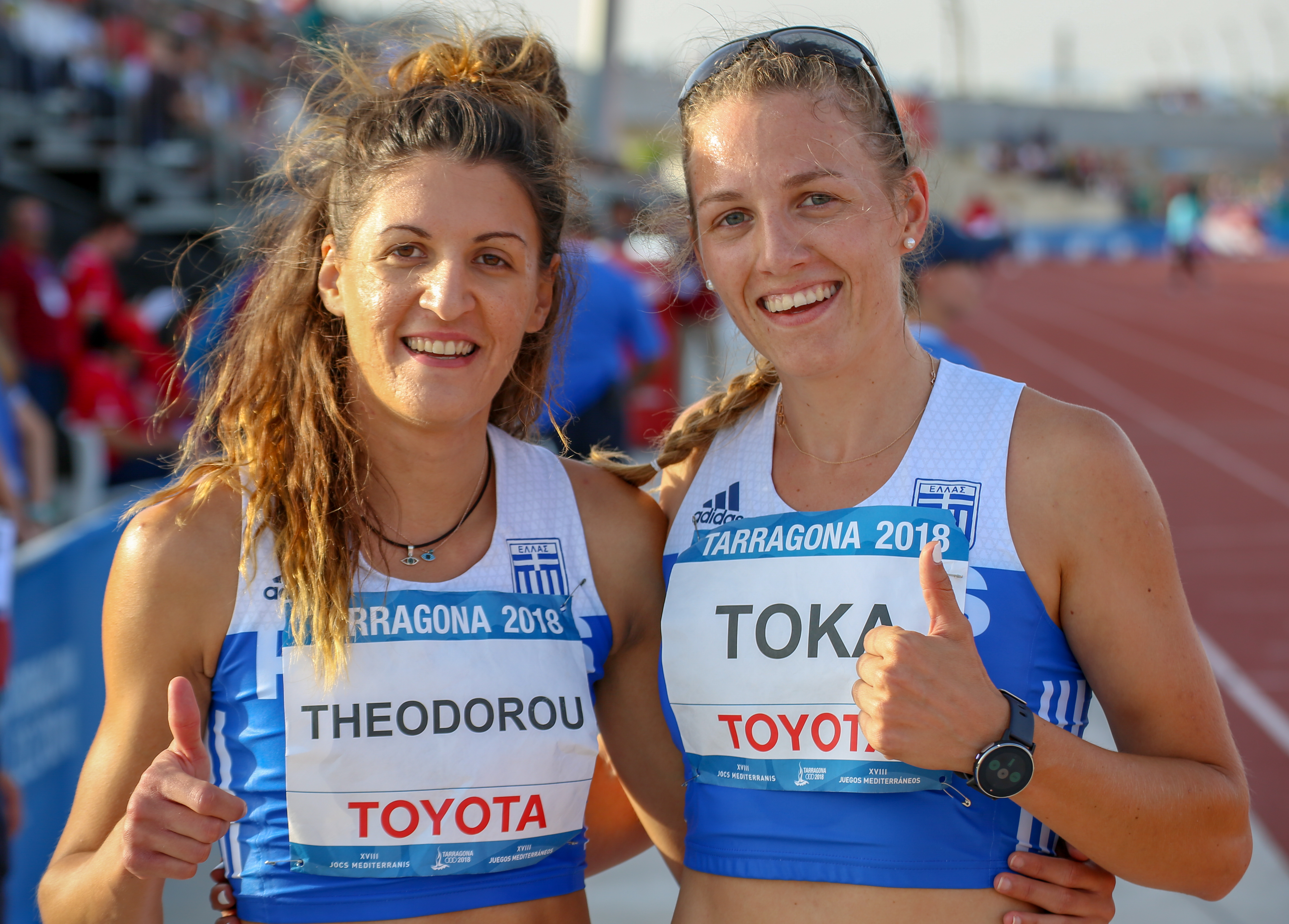 Effrosyni Theodorou y Elpida Toka, en los 400 metros vallas de los Juegos del Mediterráneo 2018